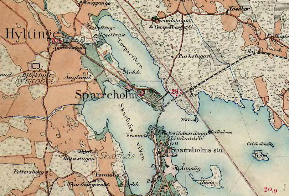 Sparreholms slott på Häradsekonomiska kartan